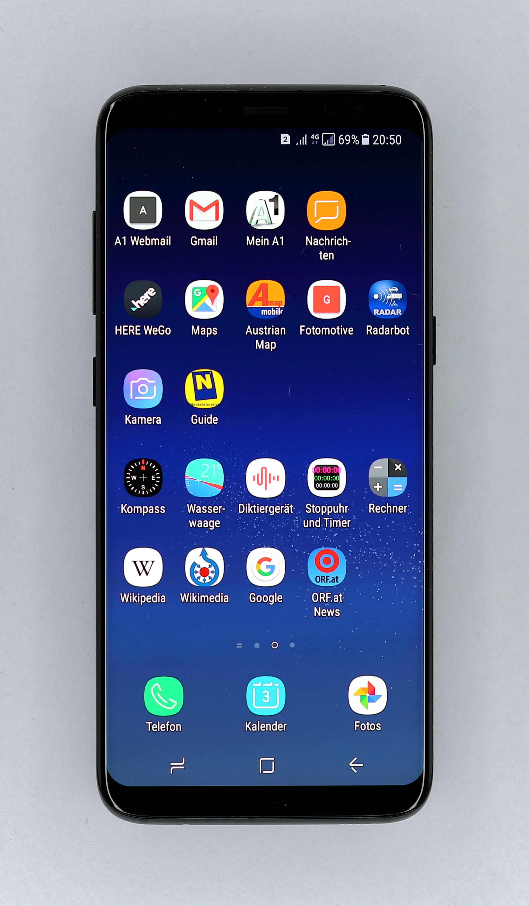 Das Smartphone Samsung Galaxy S8 Duos (SM G950FD) mit benutzerdefiniertem Startbildschirm.